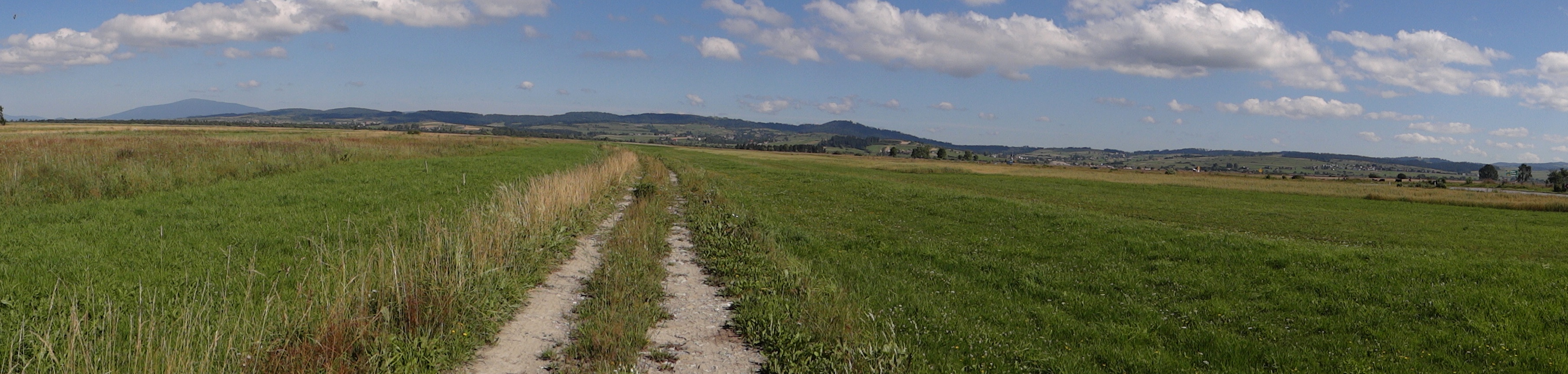 Kotlina Nowotarska w Czarnym Dunajcu. W tle Babia góra, Działy Orawskie i Beskid Orawsko-Podhalański